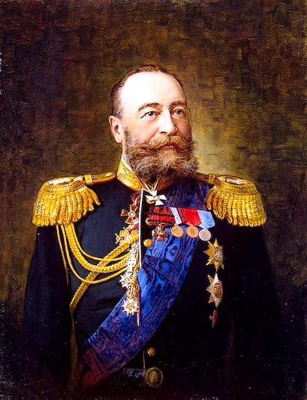 Адмирал Алексеев Евгений Иванович в мундире генерал-адъютанта, на погонах-вензеля Николая II, видны золотые аксельбанты генерал-адъютантов. (1843 — 1917) — русский военный и государственный деятель, генерал-адъютант (1901), адмирал (6 апреля 1903 года).